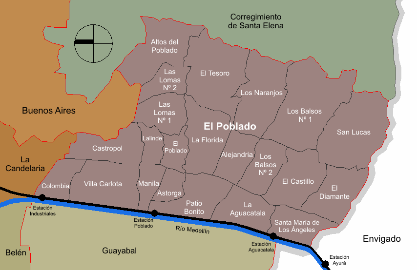 mapa de la división barrial de la comuna El Poblado. Medellín, Colombia.